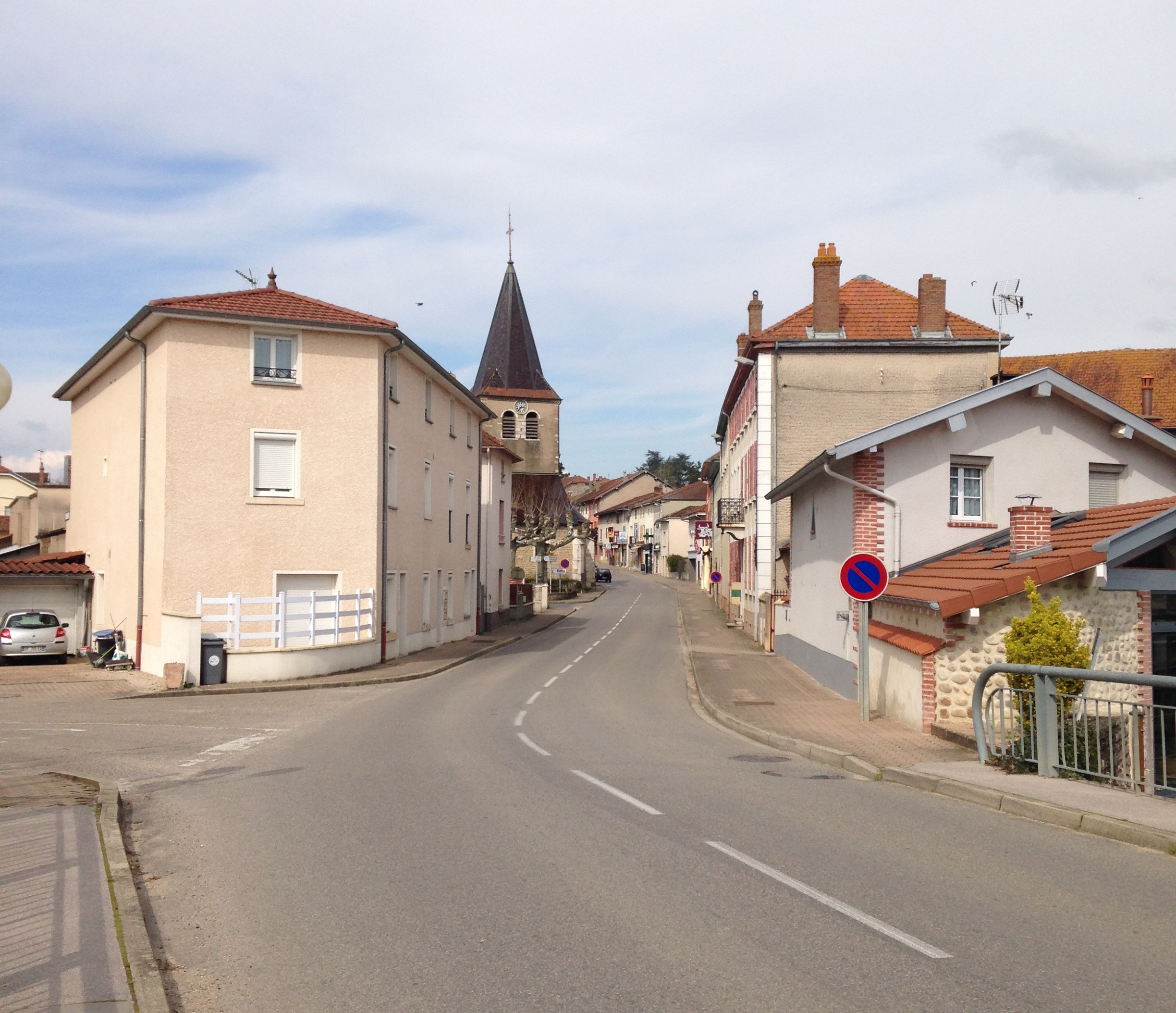 Vue de la Grande rue de Mézériat avec l'église